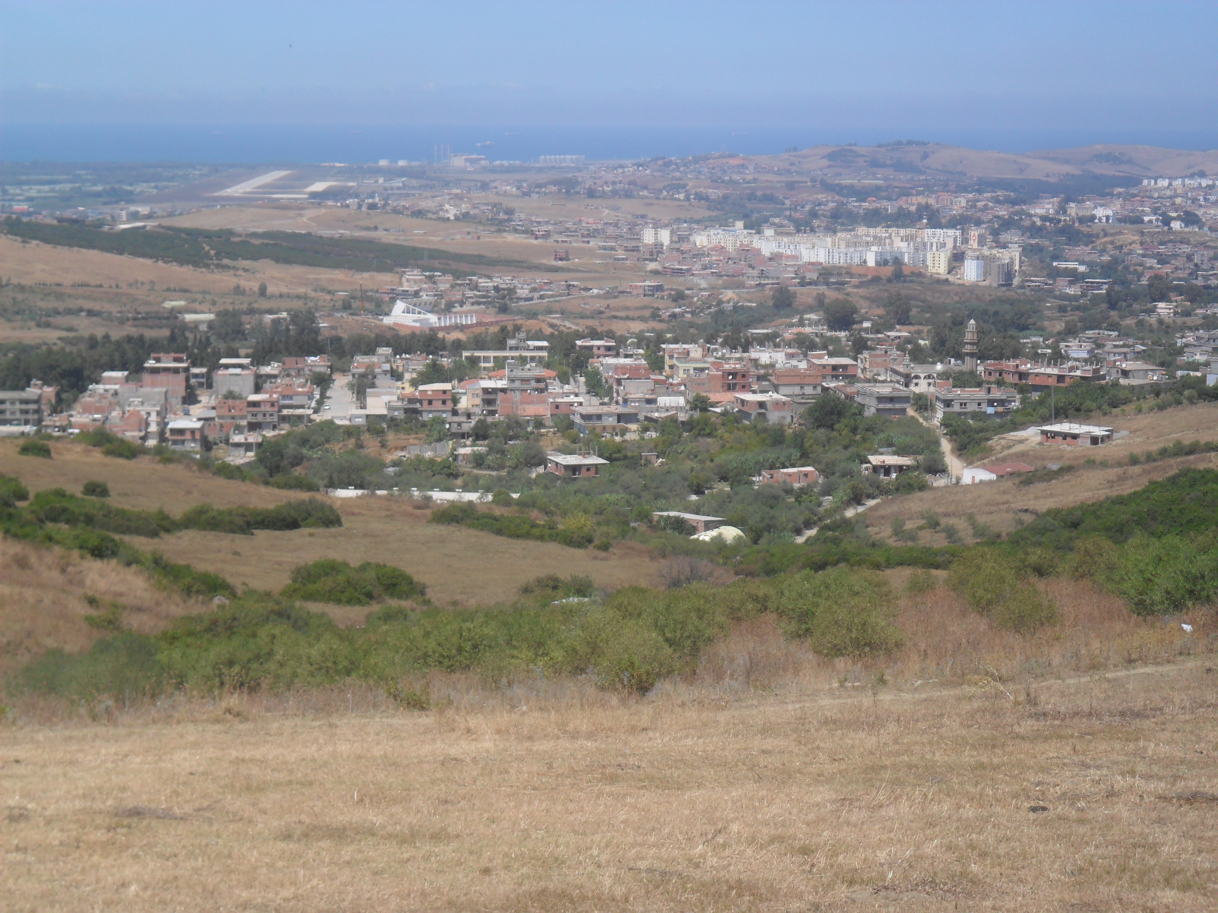 Vue Générale sur Taher (Algérie)